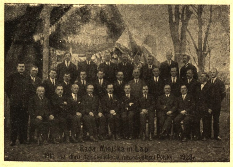 Rada Miejska m. Łap 1918 w dniu dziesięciolecia niepodległości Polski 1928r.